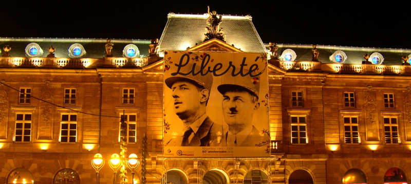 Le 23 Novembre 1944 la deuxième division blindée du général Leclerc entre dans Strasbourg après avoir parcouru plus de 100 km en 6 jours. La ville est libérée. Leclerc s’adresse alors aux Alsaciens en ces termes: « La flèche de votre cathédrale est demeurée notre obsession. Nous avions juré d’y arborer de nouveau les couleurs nationales. C’est chose faite. »